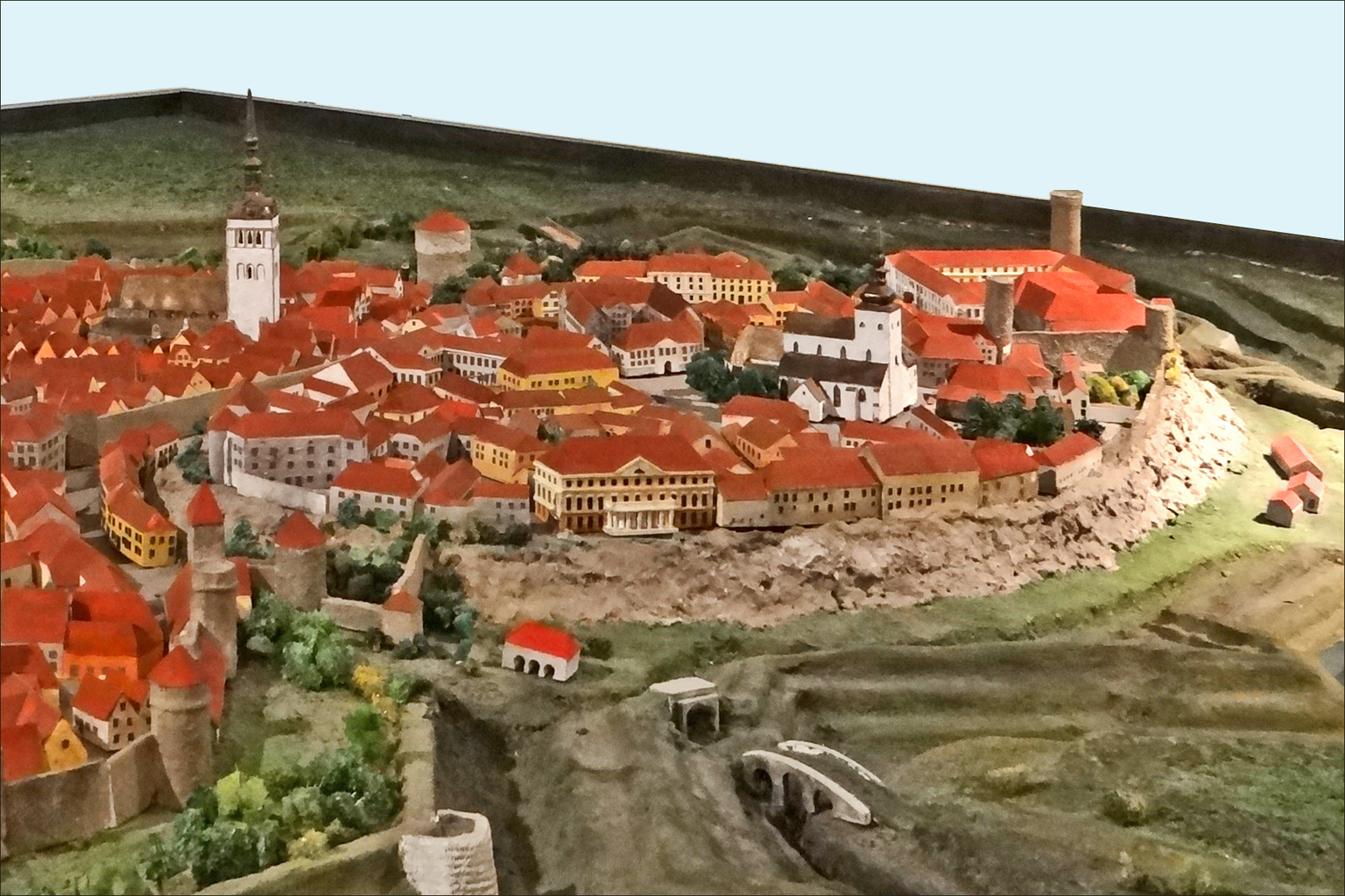 La colline de Toompea, la ville haute (détail de la maquette de Tallinn en 1825) Salle du rez-de-chaussée du musée de la ville de Tallinn On remarque que la cathédrale orthodoxe russe n'est pas encore construite __________ Le musée historique le plus moderne et le mieux présenté de Tallinn expose les aspects principaux du passé et du développement de la ville. Les différentes composantes de la société médiévale sont expliquées grâce à un choix de textes, d’objets, de modèles grandeur nature et d’effets sonores. Dans les étages supérieurs, des présentations de haute qualité sont consacrées au XXe siècle et à ses guerres, à l’occupation soviétique et enfin à l’indépendance (extrait du site) linnamuuseum.ee/linnamuuseum/